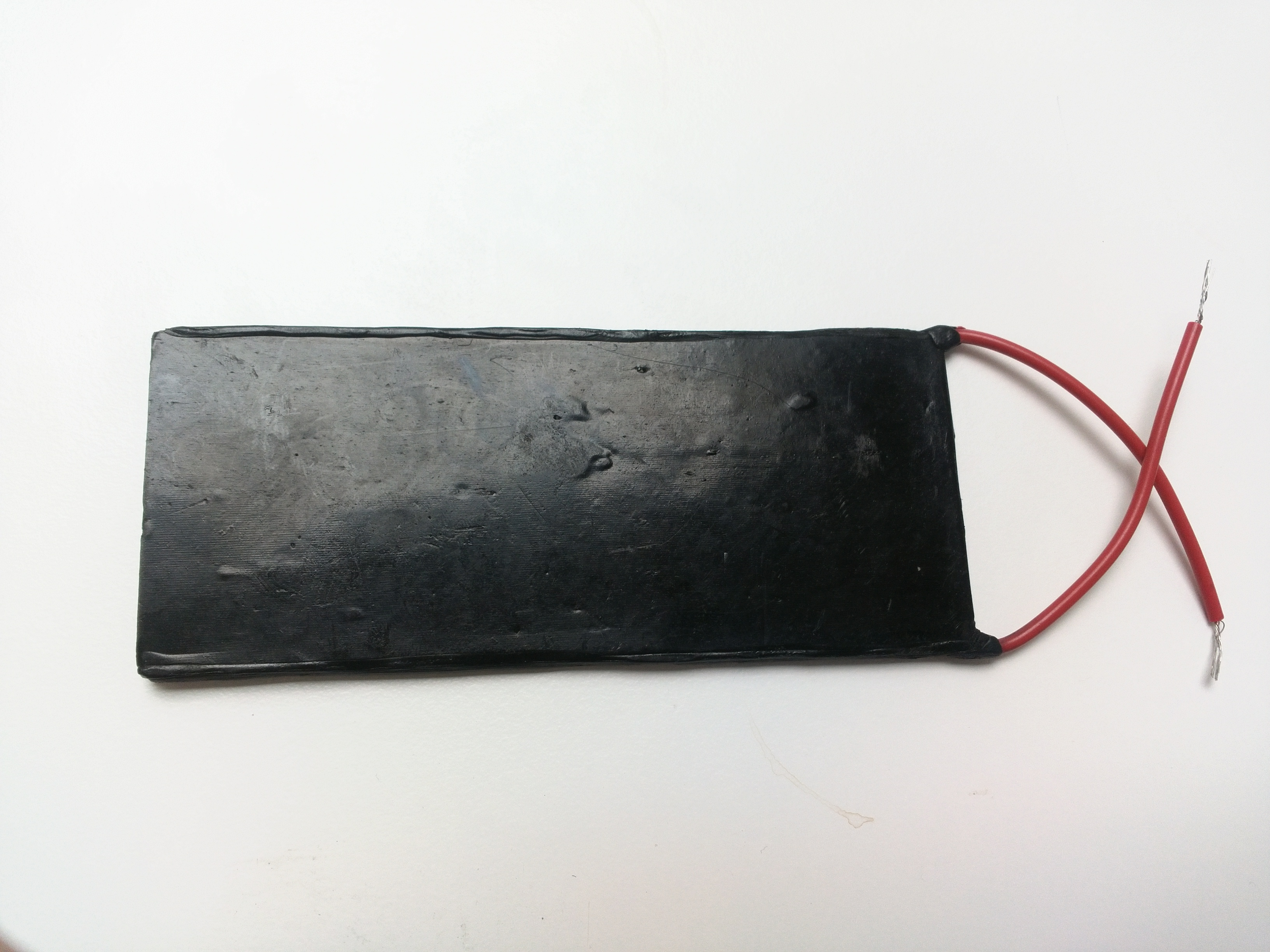 Élément simple de matériau électroformable avec électrodes pour application d'une tension électrique.